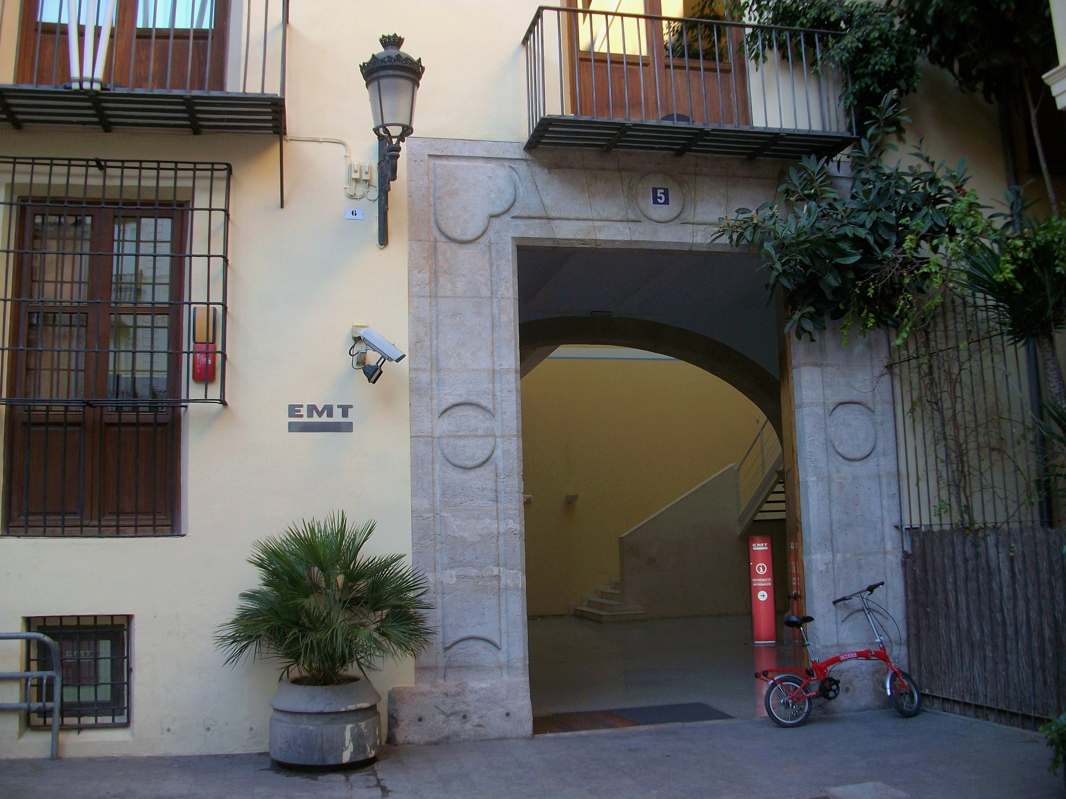 Seu de l'EMT de València a la plaça del Correu Vell.